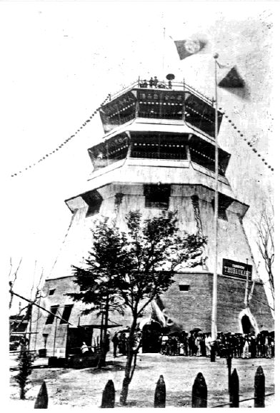 西成郡今宮村（現在の中央区日本橋）に存在した「眺望閣」。「五階百貨店」の名称の由来となった。